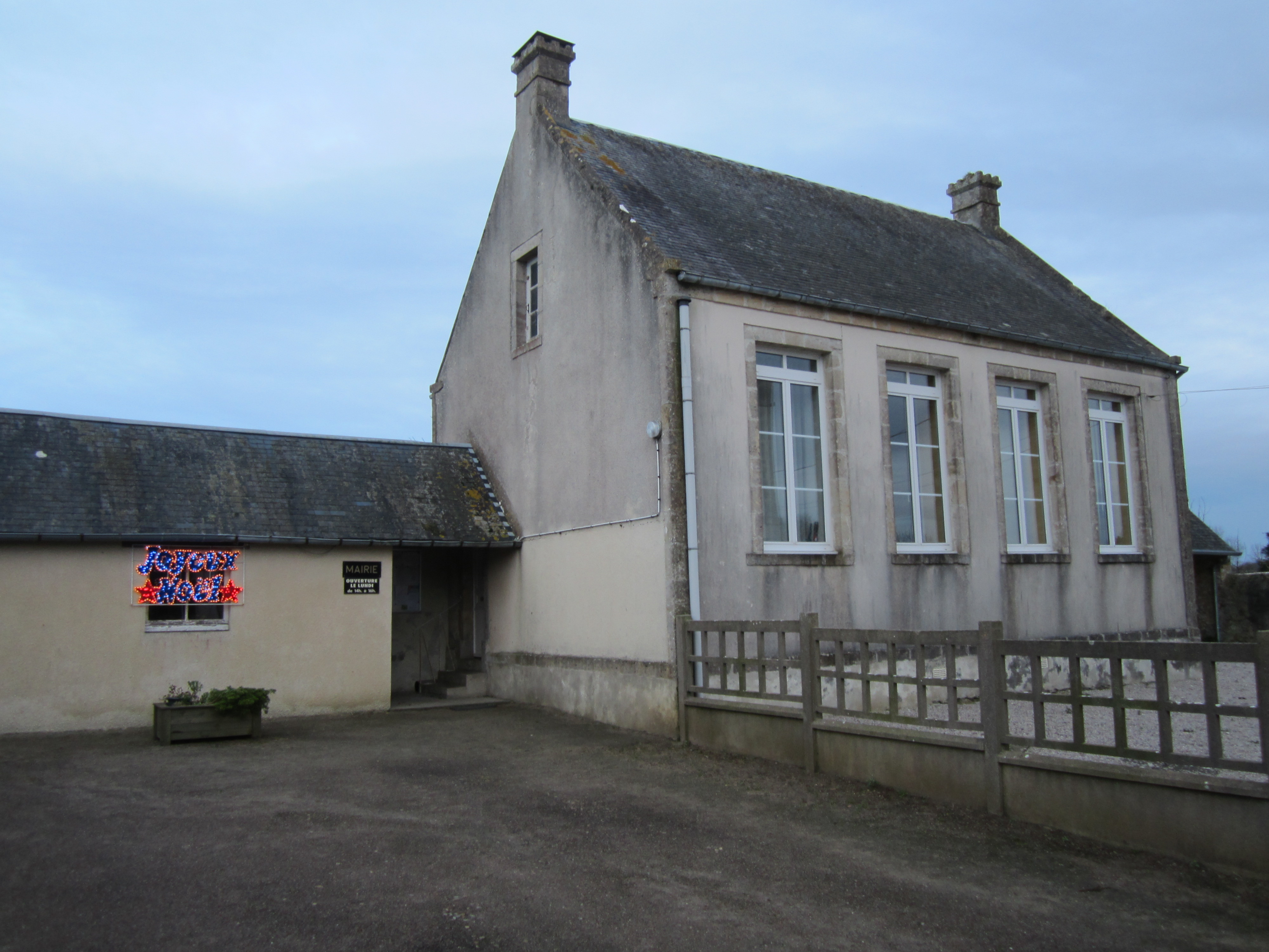 Foucarville, Manche